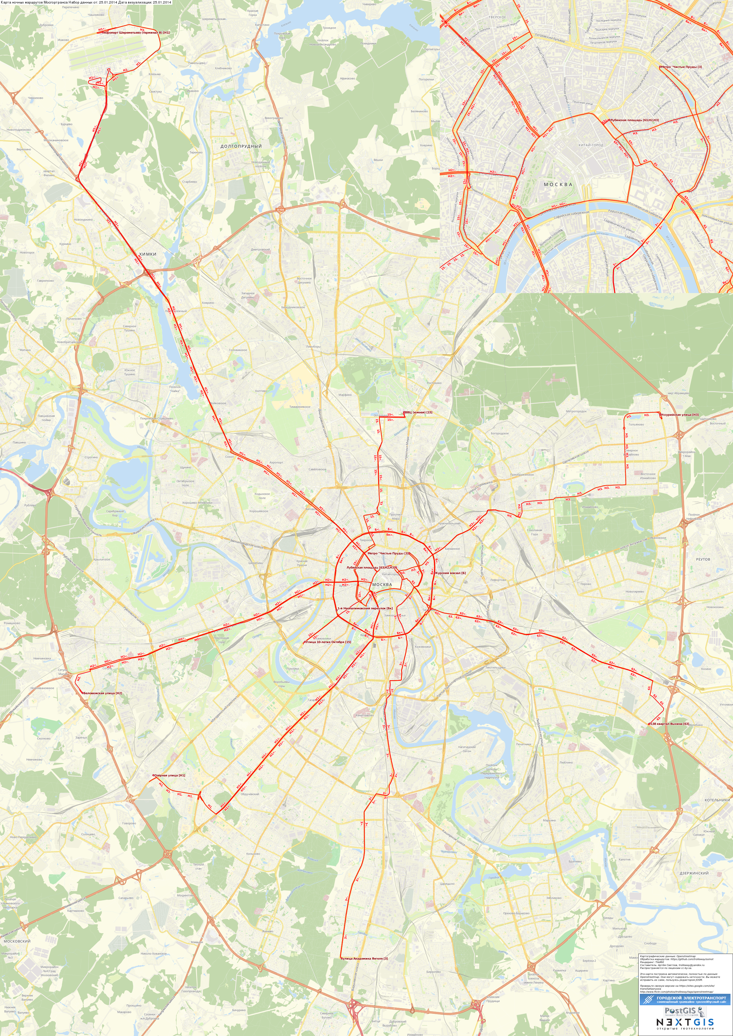 Карта ночных маршрутов Мосгортранса.